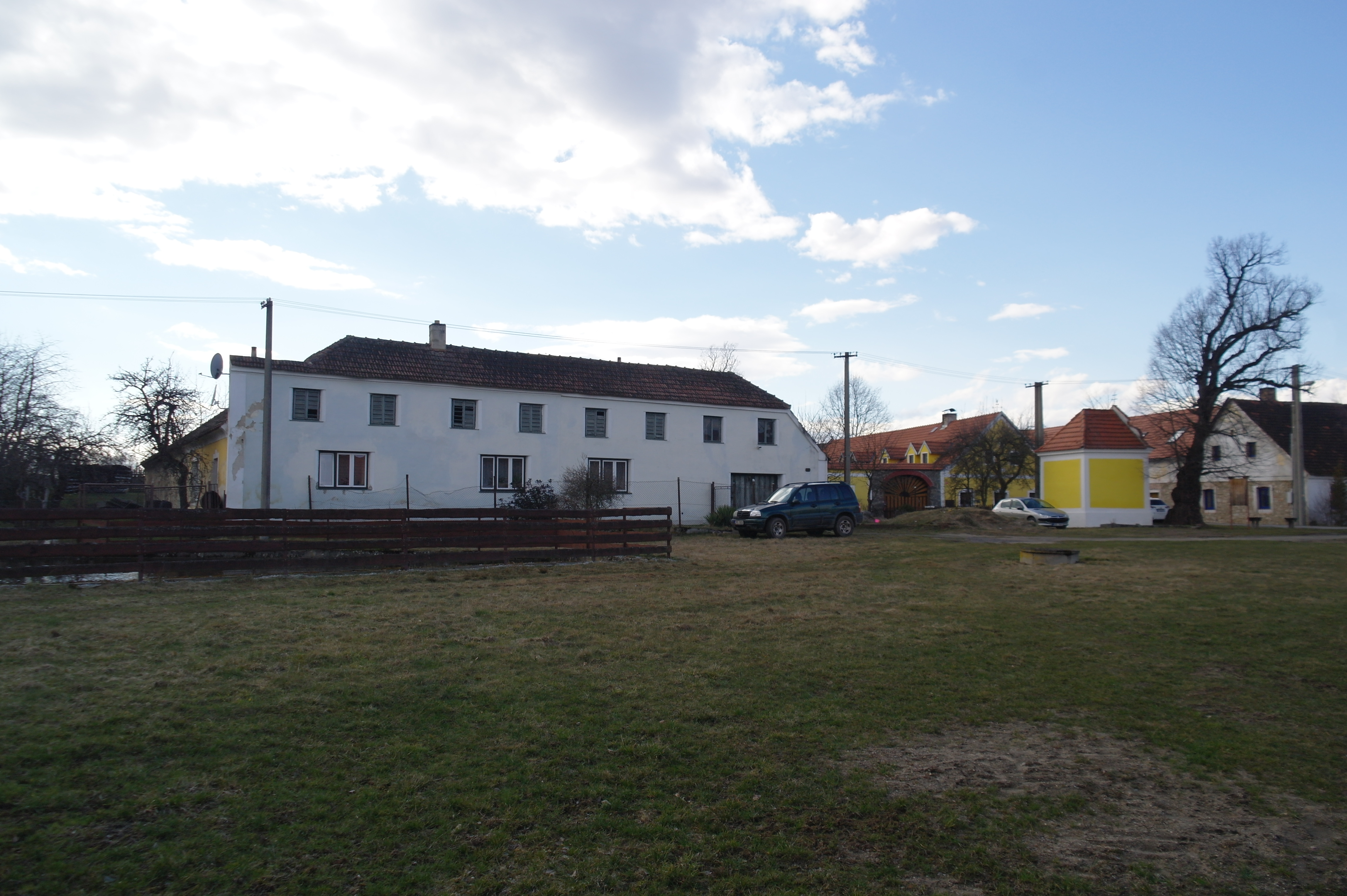 Božejov, západní strana návsi se statkem čp. 16